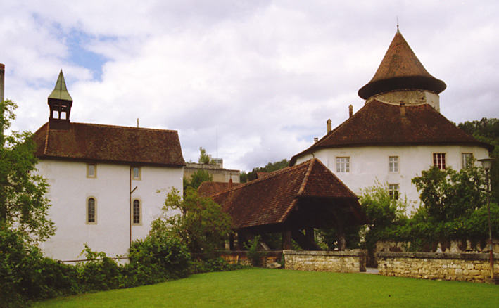 Schloss Zwingen, Kernburg, Bergfried, Kapelle, Holzbrücke